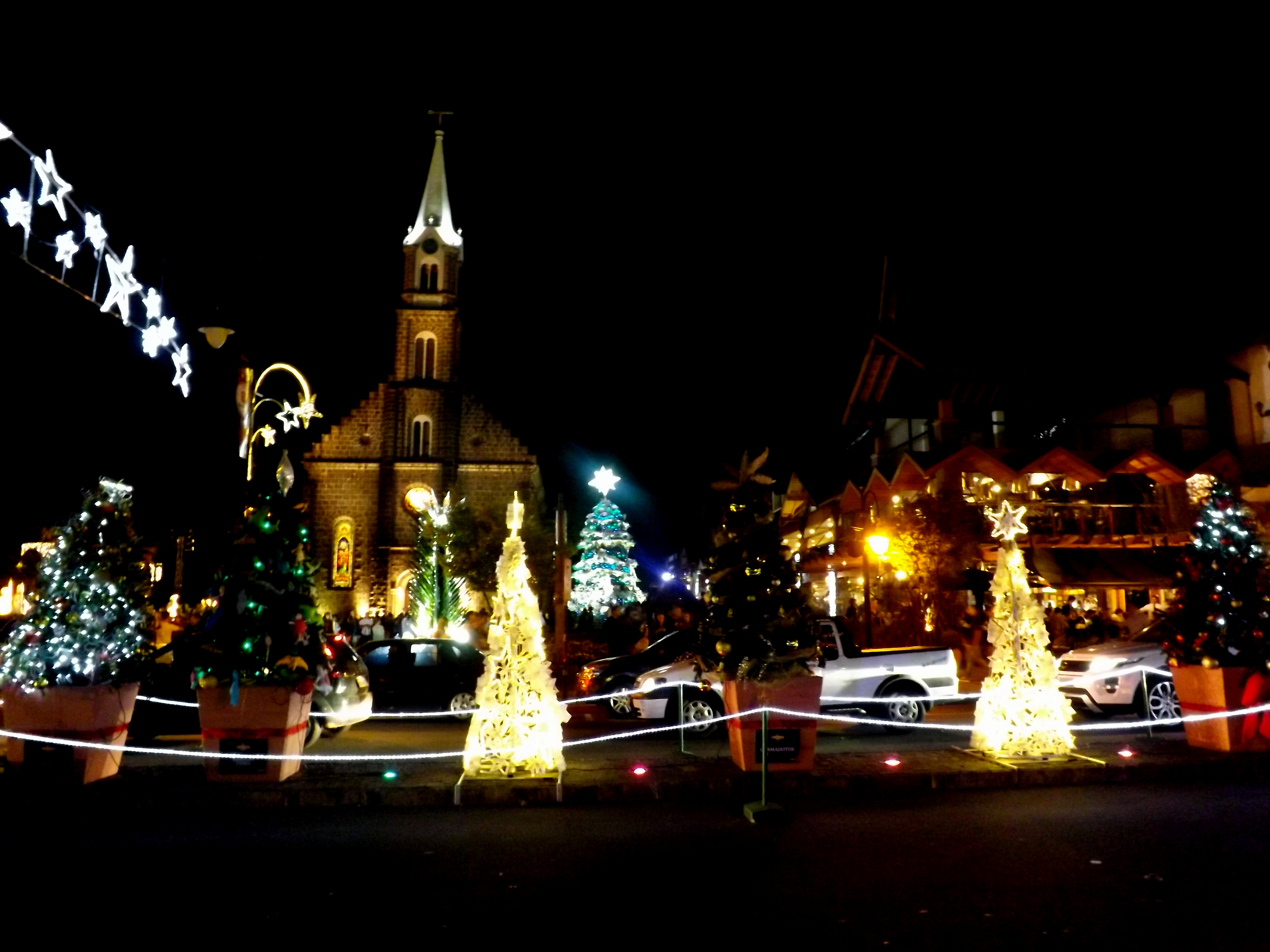 Natal Luz - Gramado - Show de acendimento